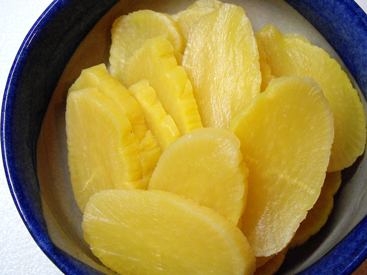 沢庵